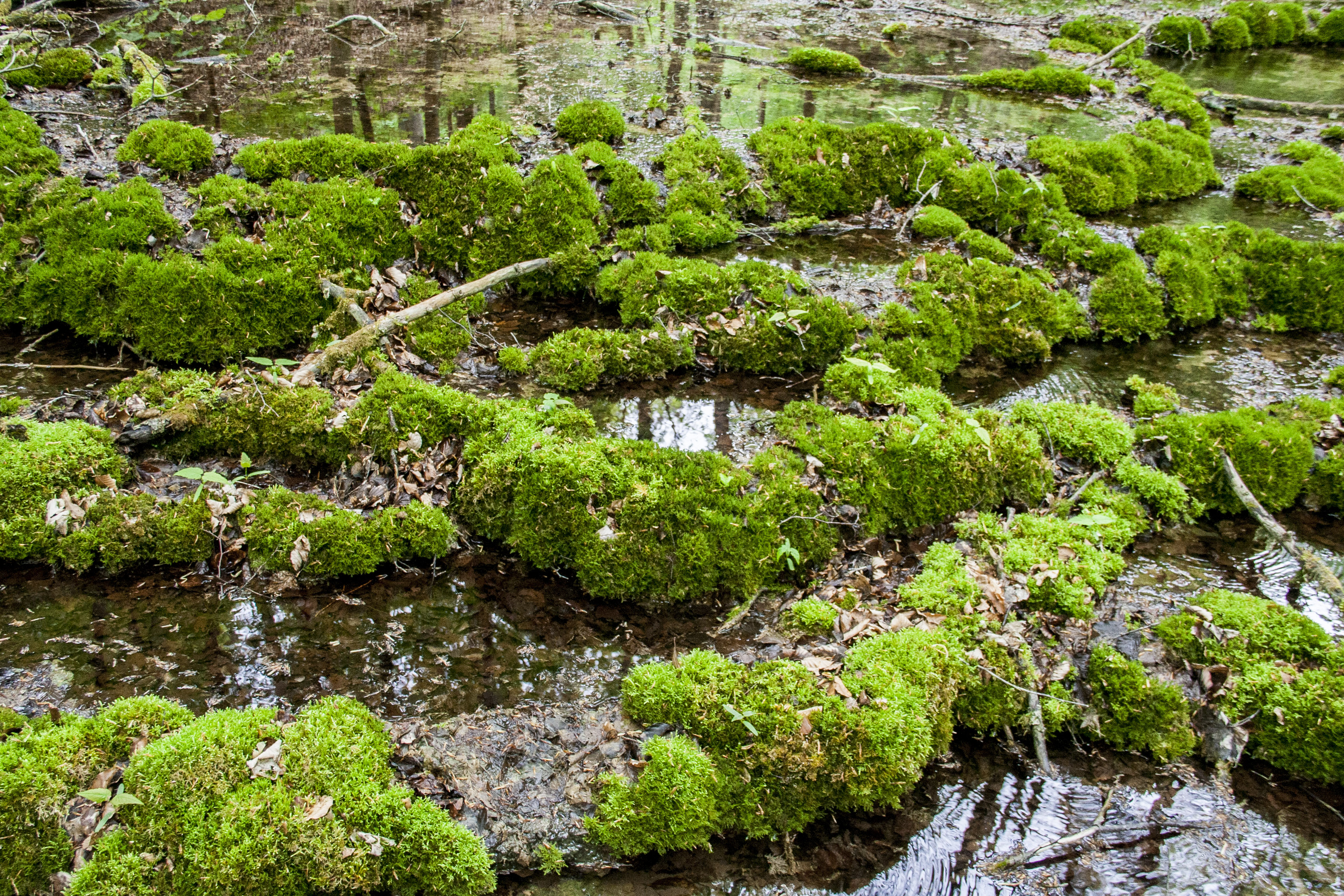 Sinterterrassen, Untermässing, Geschützter Landschaftsbestandteil, Greding, Geotop, Naturpark Altmühltal